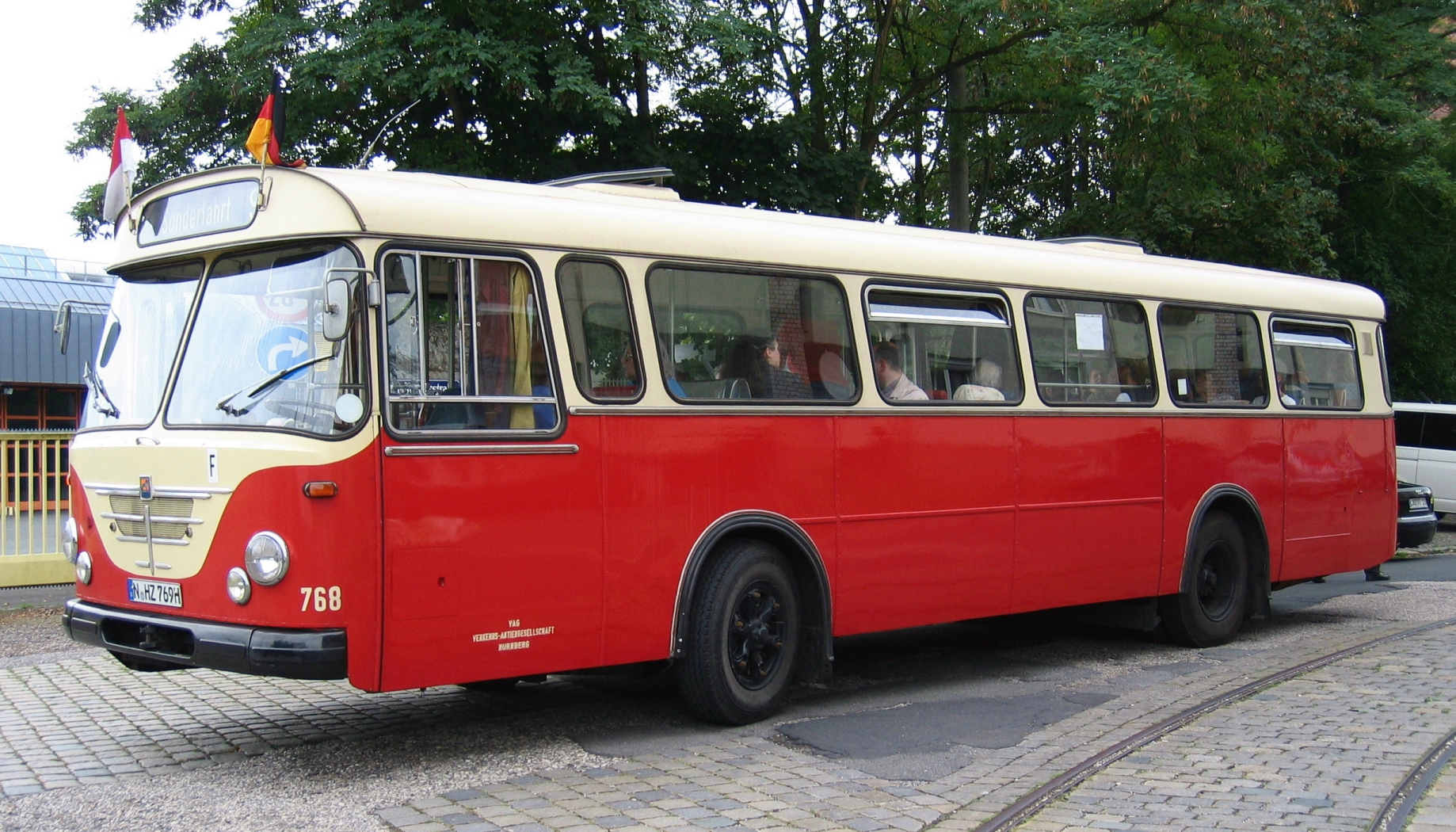 1969 Büssing Präfekt 12D (Wagen 768) der VAG Verkehrs-Aktiengesellschaft Nürnberg